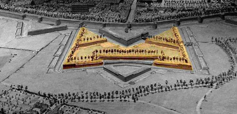 Sur le plan-relief de Tournai, un ouvrage à cornes projeté devant une demi-lune.